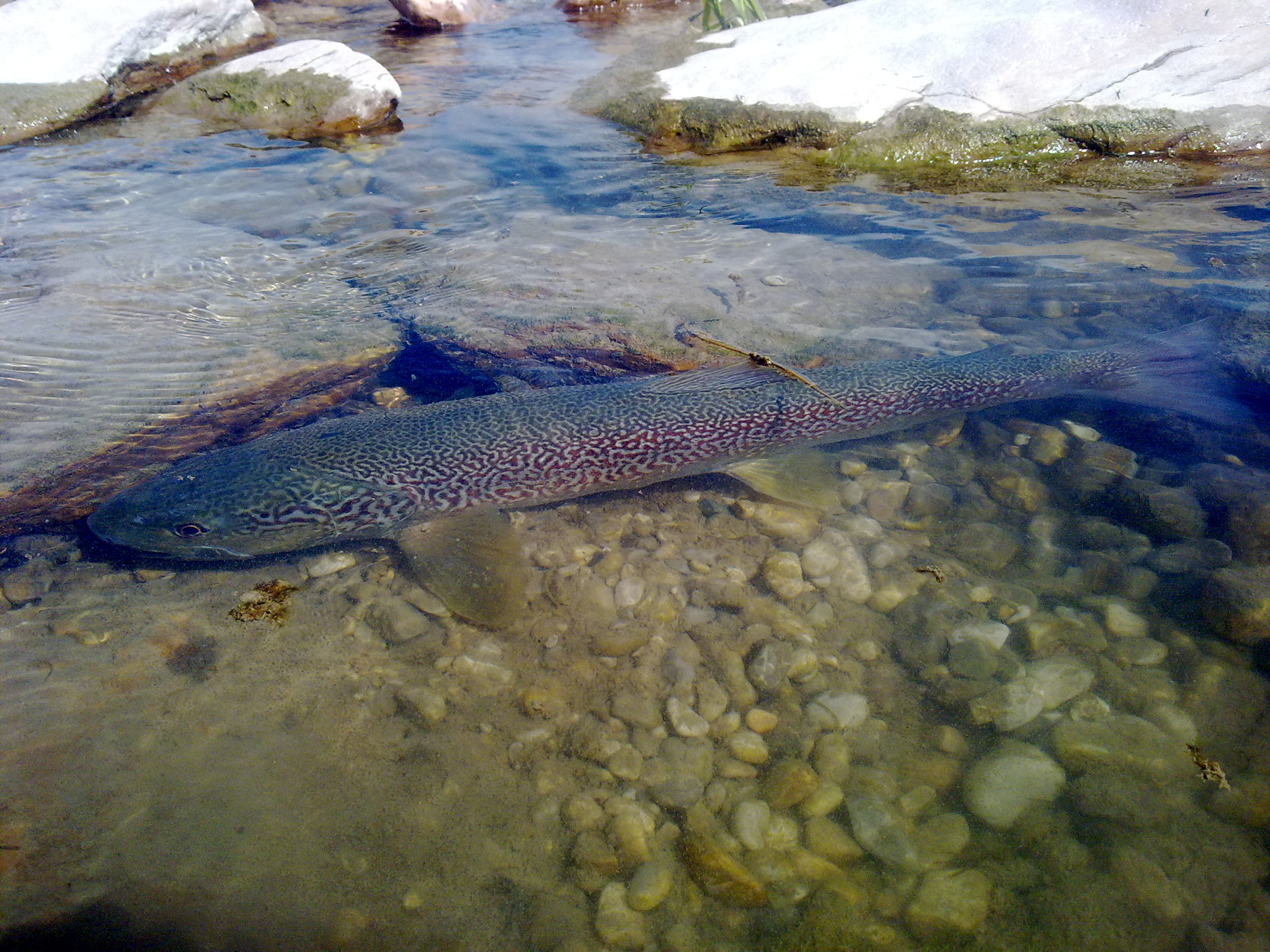 Esemplare di 64 cm di trota marmorata pura. Da notare la livrea, la marmoreggiatura è estesa su tutto il corpo, in particolare sugli opercoli branchiali, particolare che distingue gli ibridi dagli esemplari puri.